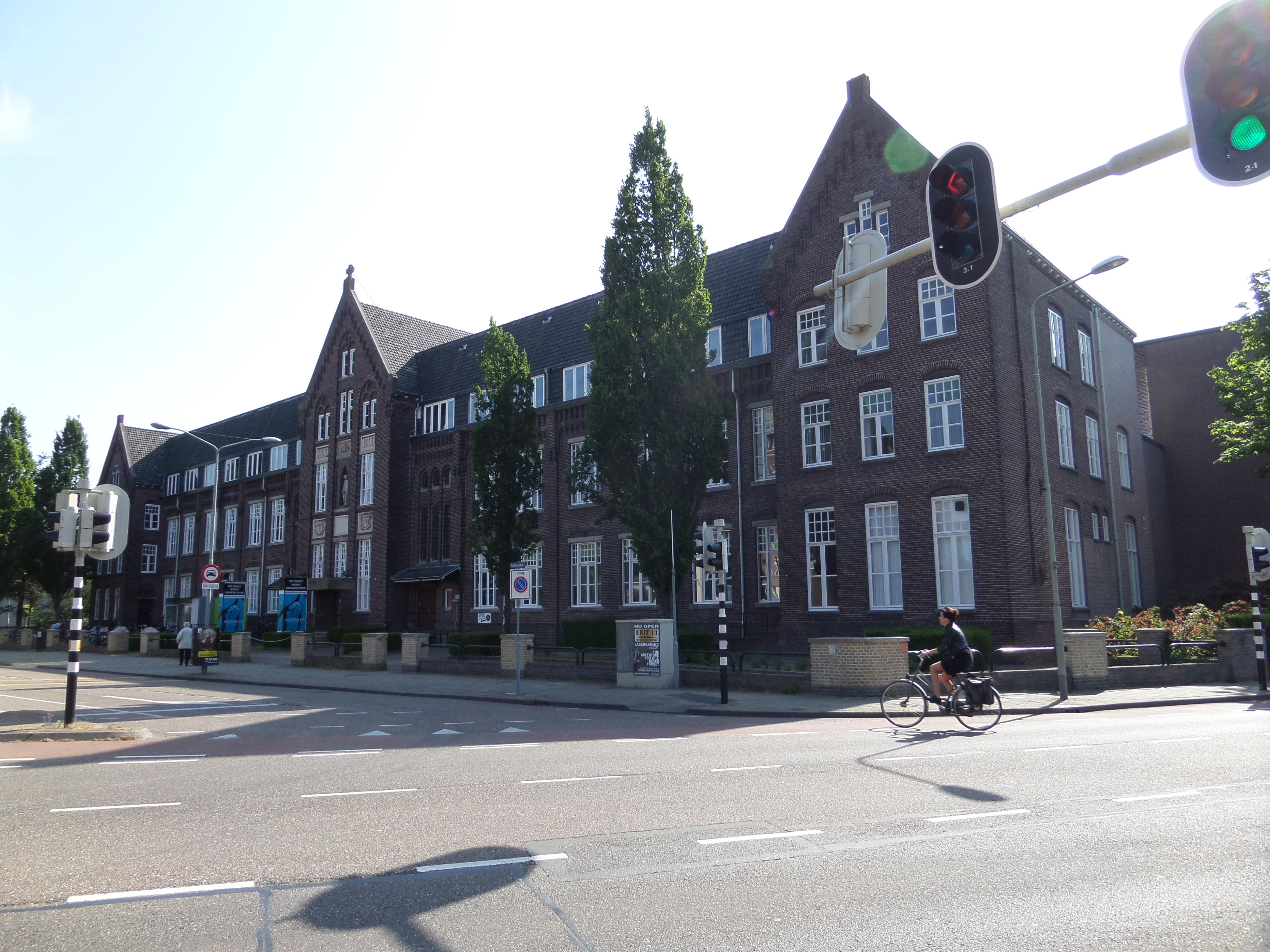 Voormalig Bisschoppelijk College Sittard uit 1908, gezien vanaf de voorzijde. Het bouwwerk is aangewezen als gemeentelijk monument.